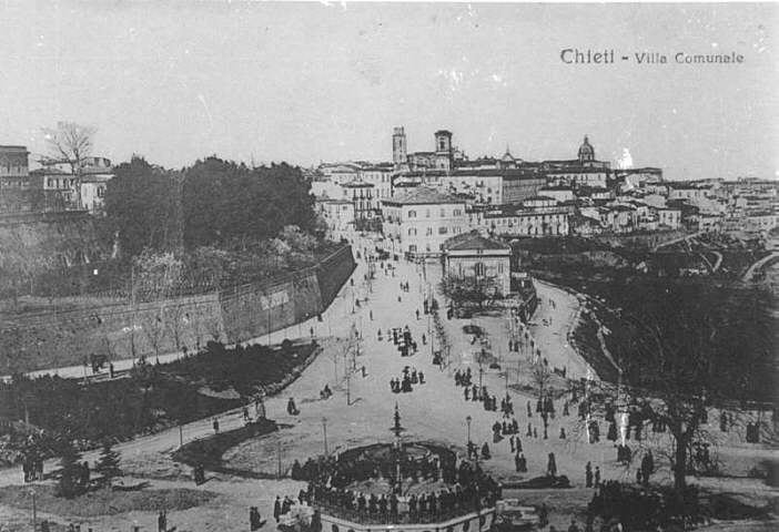 Vecchia foto che ritrae il piazzale Mazzini della Villa comunale di Chieti con la grande fontana posta al centro.